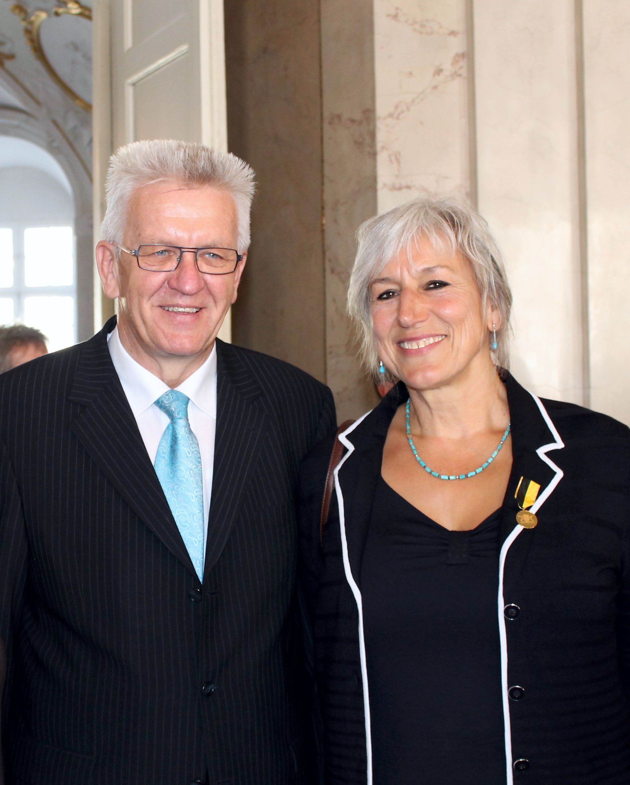 Hertha Beuschel-Menze (rechts), neben Ministerpräsident Winfried Kretschmann, erhält den Verdienstorden des Landes Baden-Württemberg